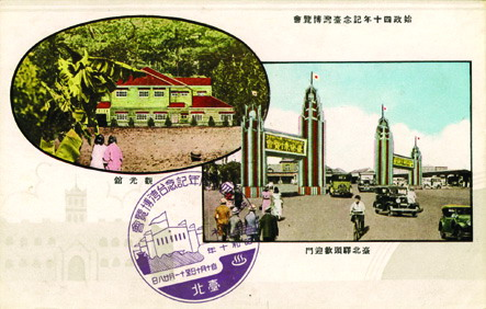 1935年台灣博覽會所發行的明信片。